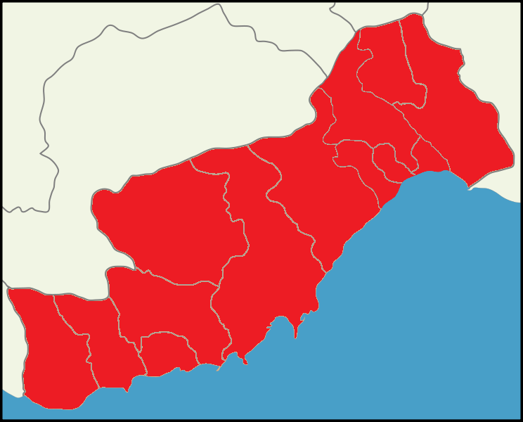 Mersin'de 2014 Türkiye cumhurbaşkanlığı seçimi